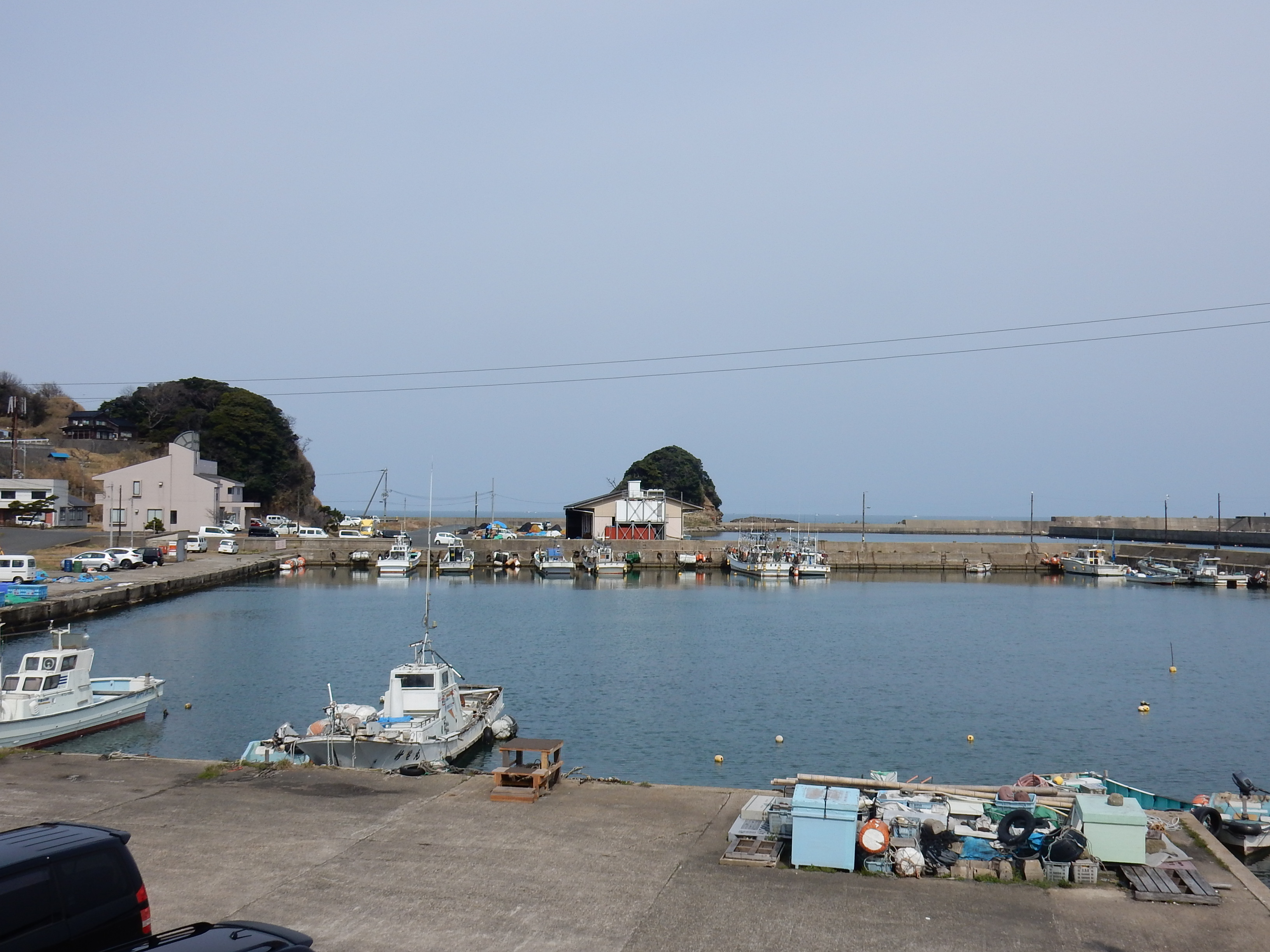 浅茂川港（京都府京丹後市網野町浅茂川） Nikon Coolpix S9900